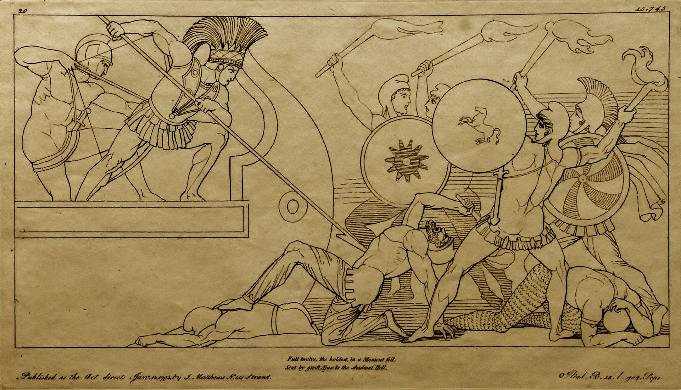 Kupferstich (1795) von Tommaso Piroli (1752 – 1824) nach einer Zeichnung (1793) von John Flaxman (1755 – 1826).